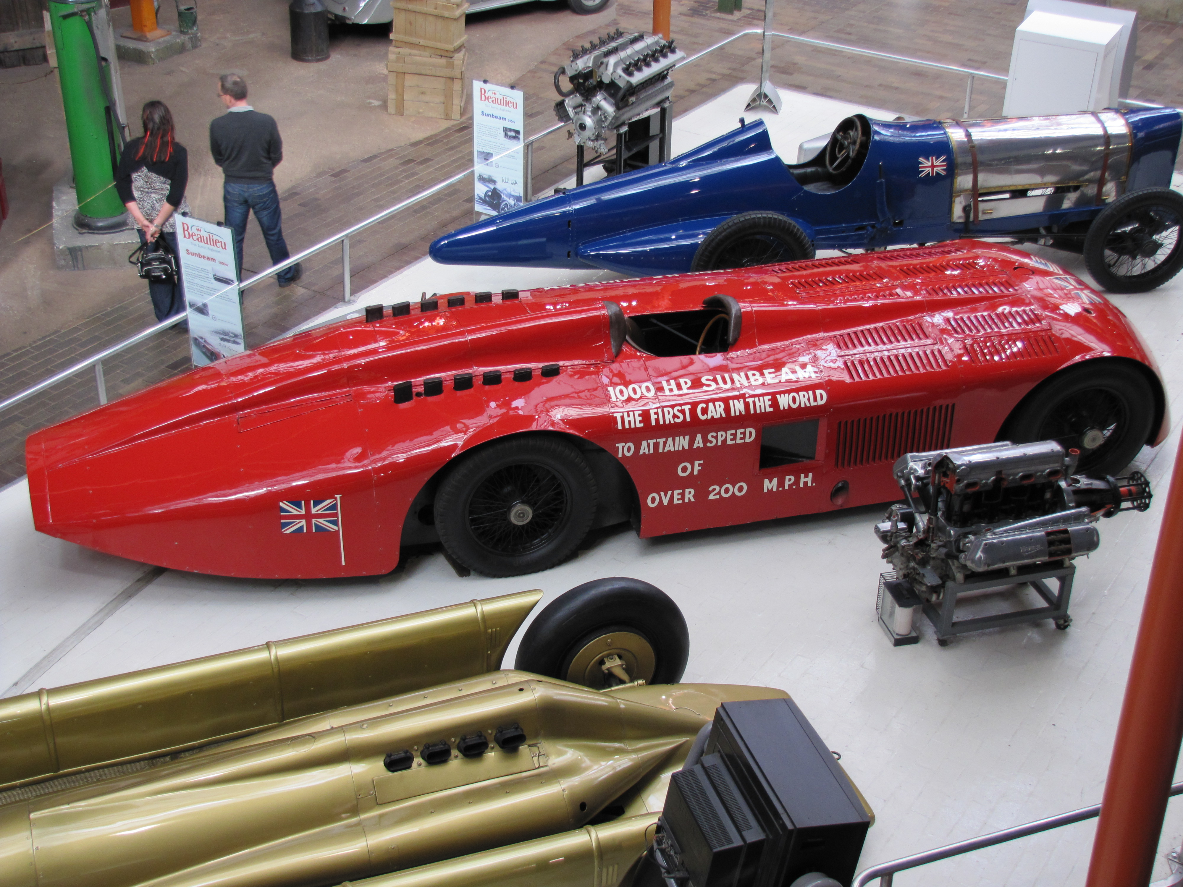 Beaulieu National Motor Museum, Beaulieu, Hampshire, England